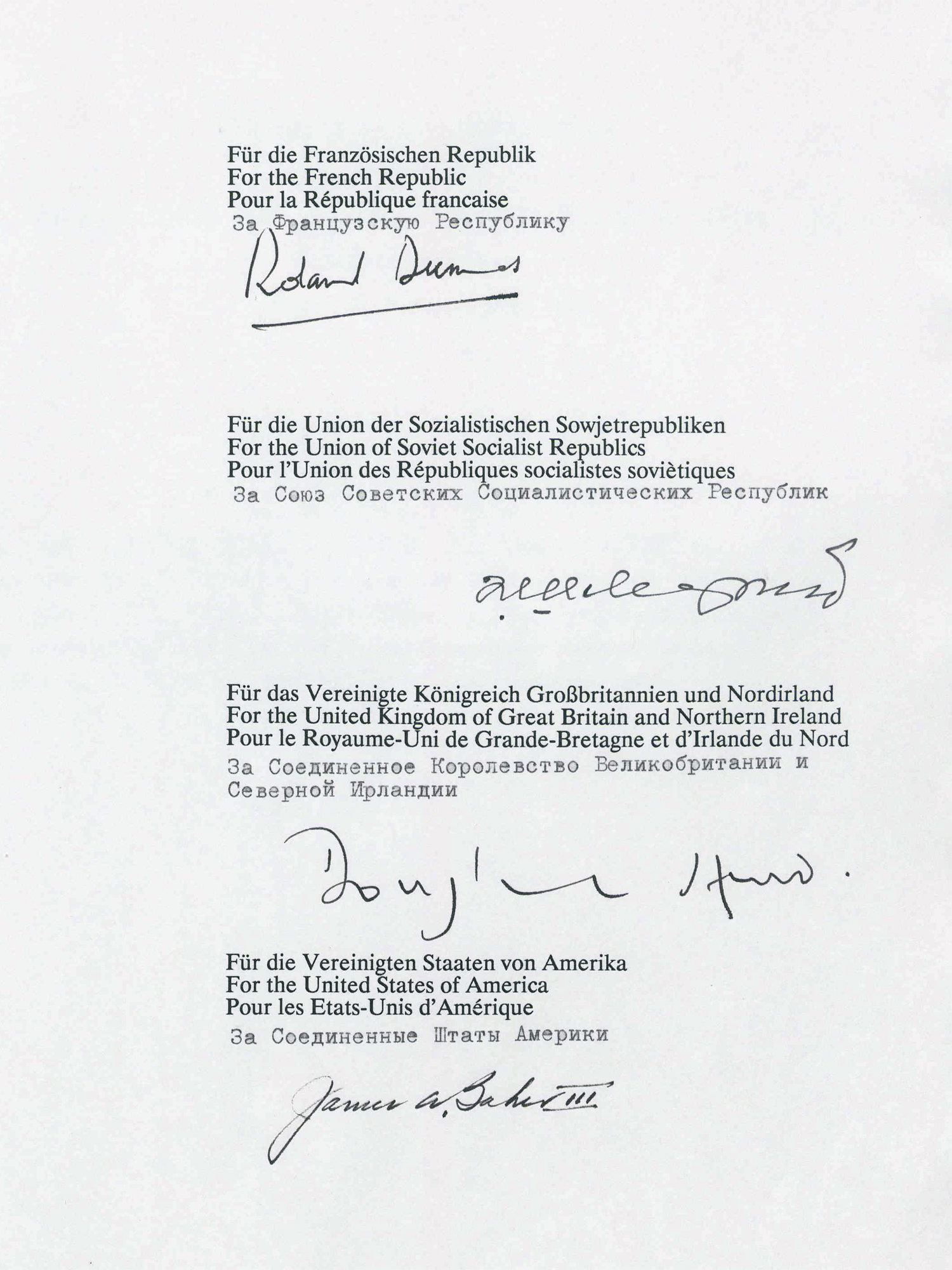 Unterschriften der Allierten auf dem 2+4-Vertrag